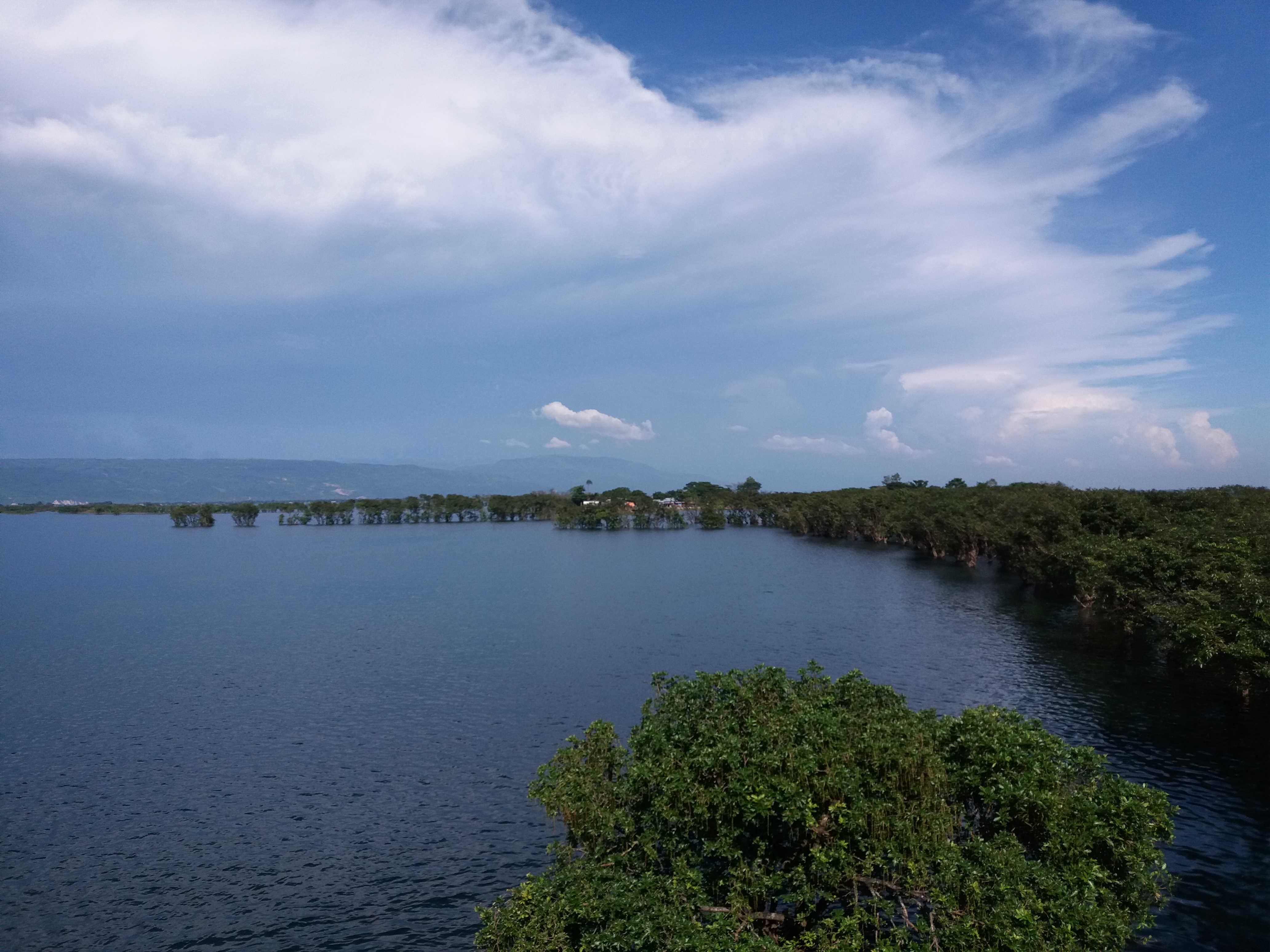 টাঙ্গুয়ার হাওর, সুনামগঞ্জ।